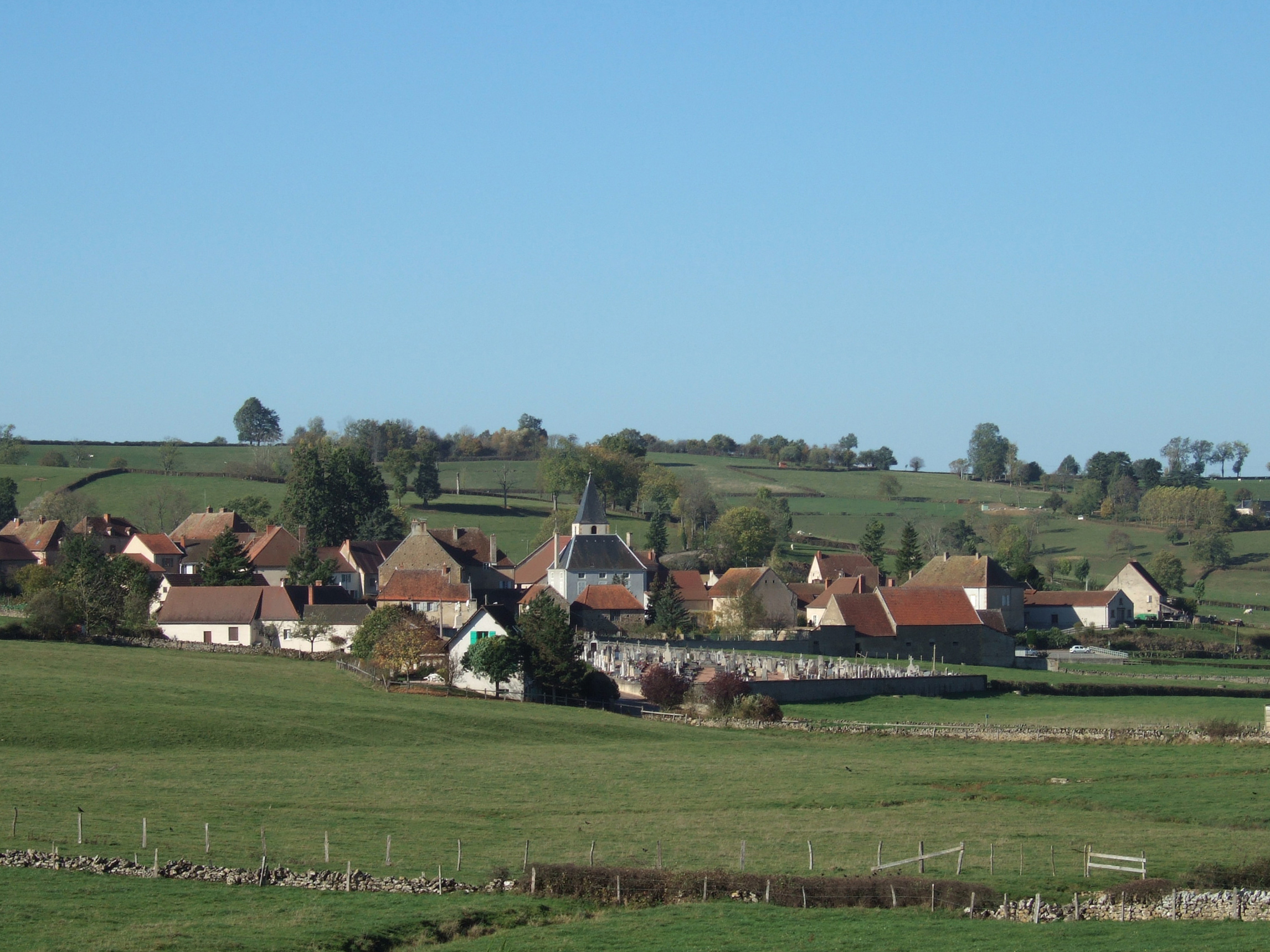 Vue du village de St Julien de Civry depuis le hameau de Civry